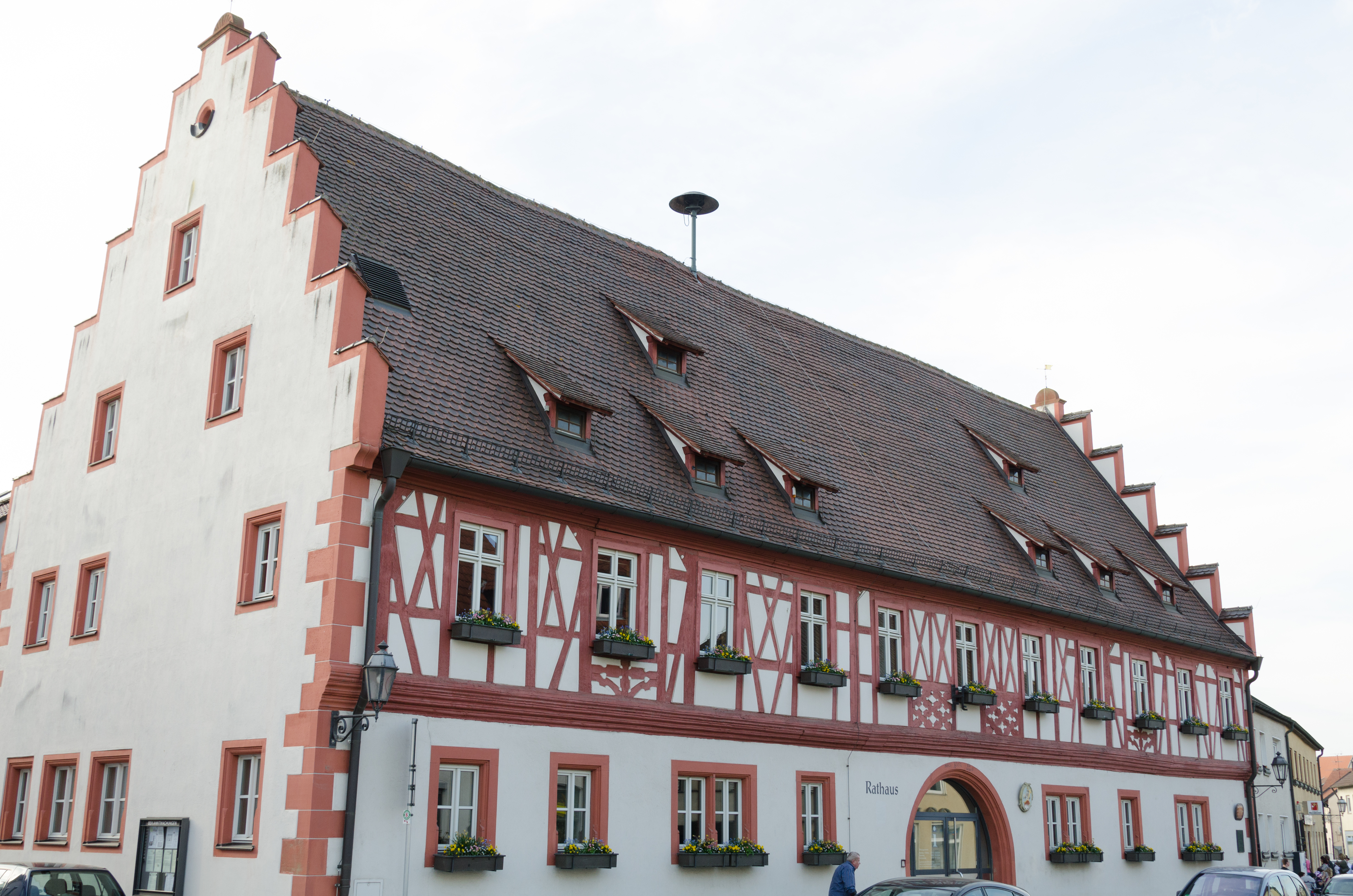 Grafenrheinfeld, Marktplatz 1